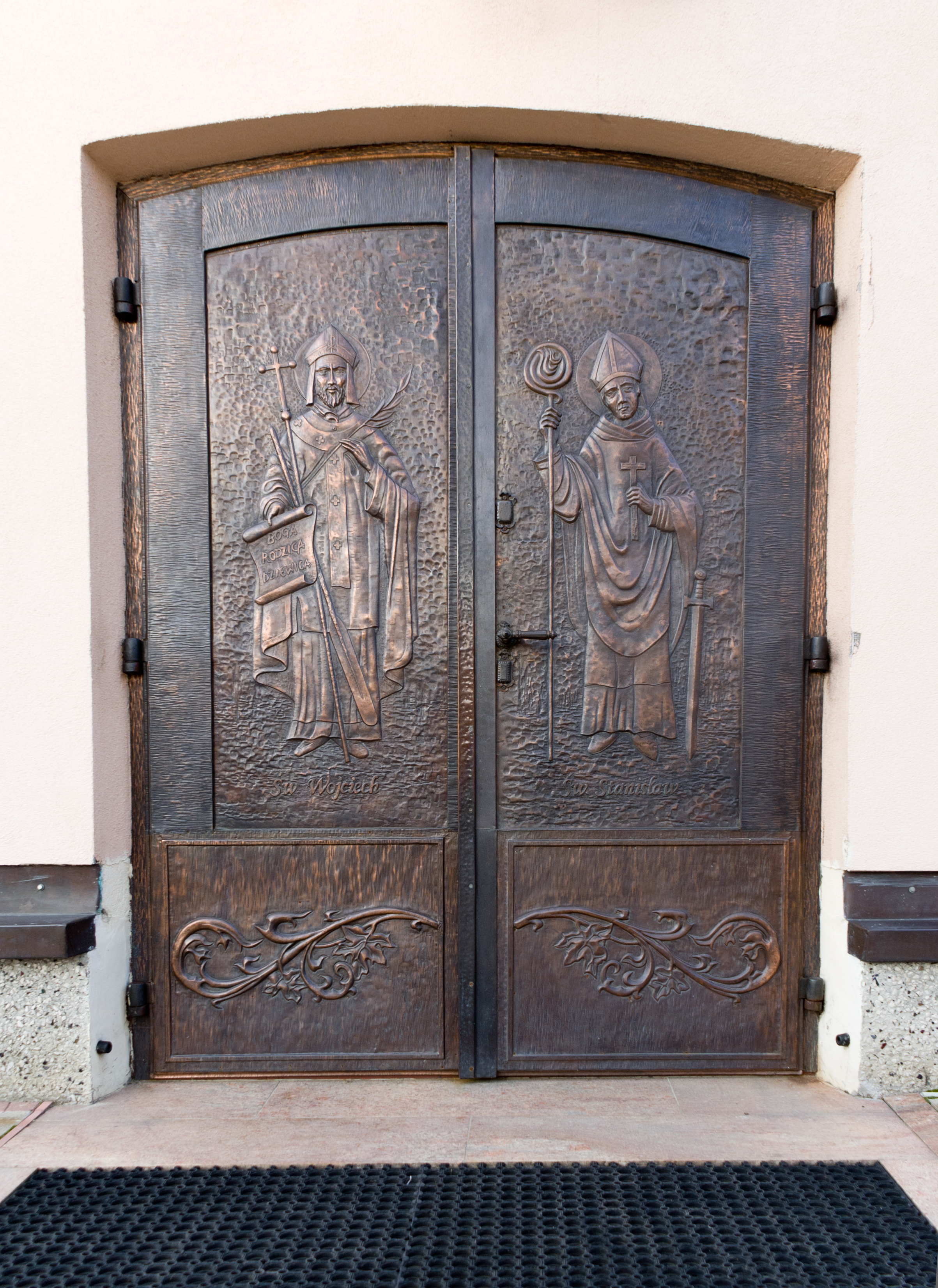 Drzwi wejściowe do kościoła św. Stanisława Biskupa w Nozdrzecu z rzeźbionymi postaciami św. Wojciecha i św. Stanisława.